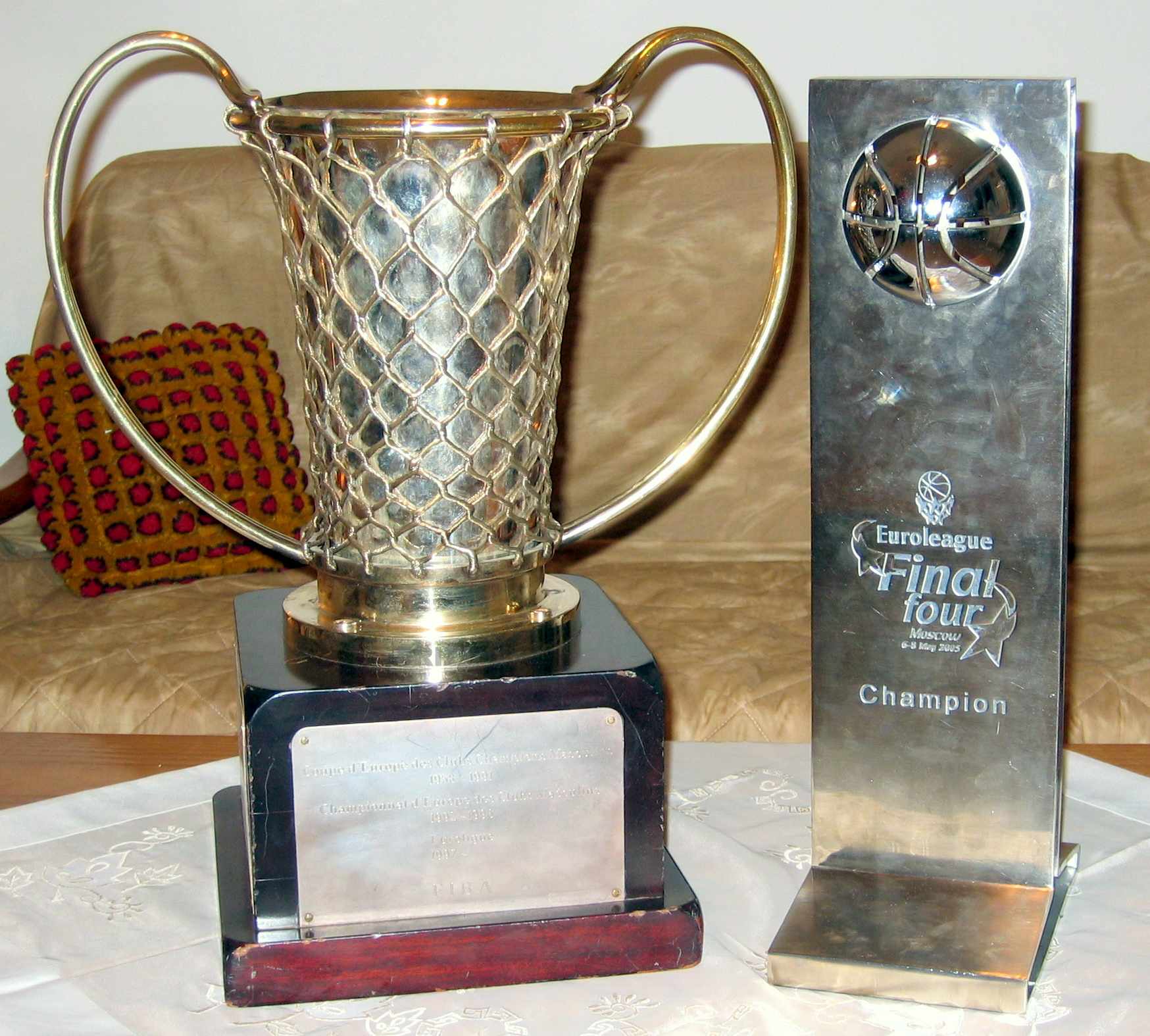 שני גביעי אירופה בהם זכתה קבוצת מכבי ת"א בכדורסל השמאלי משנת 1977 והימני משנת 2005